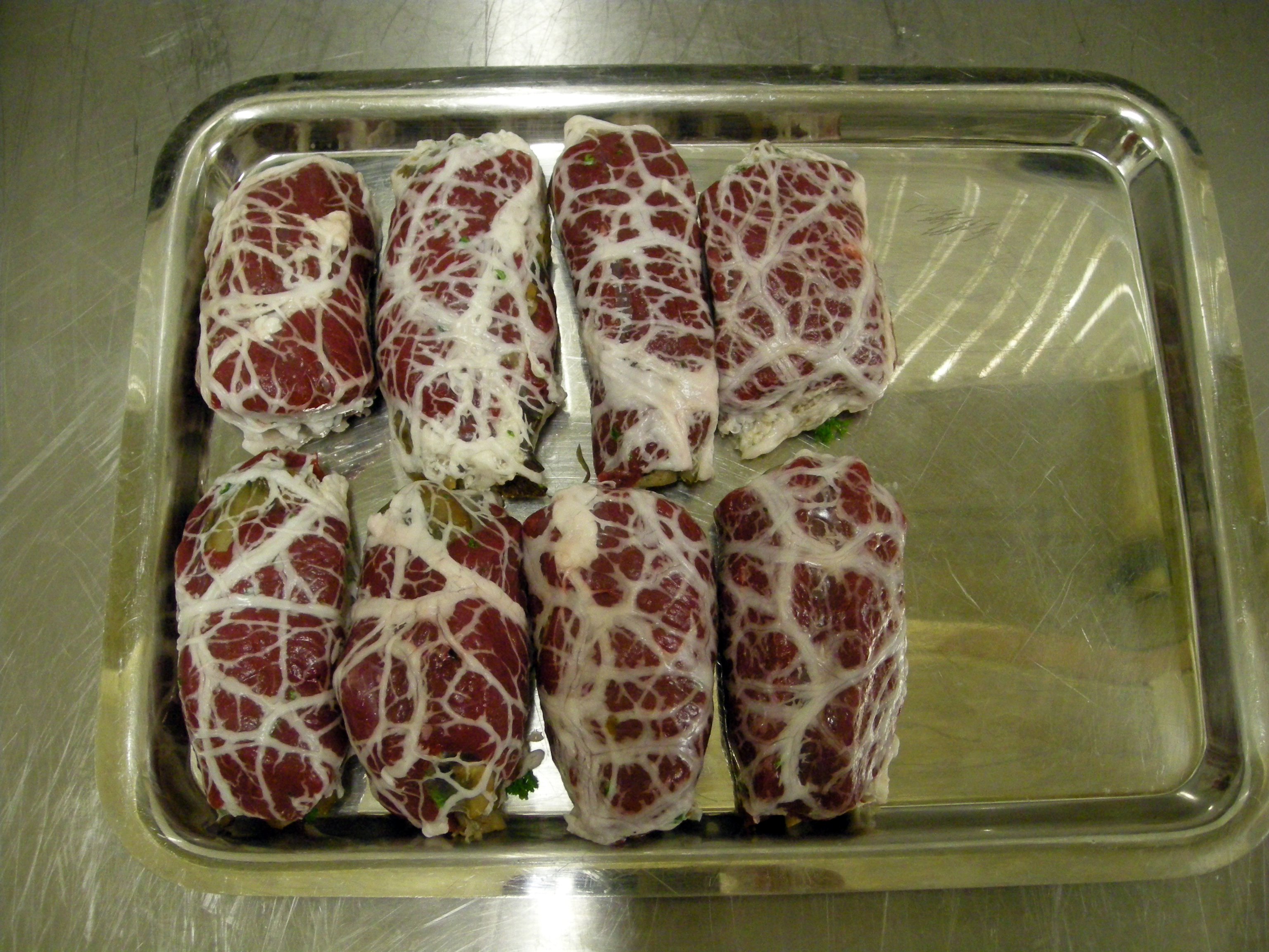 Crepinette van struisvogel